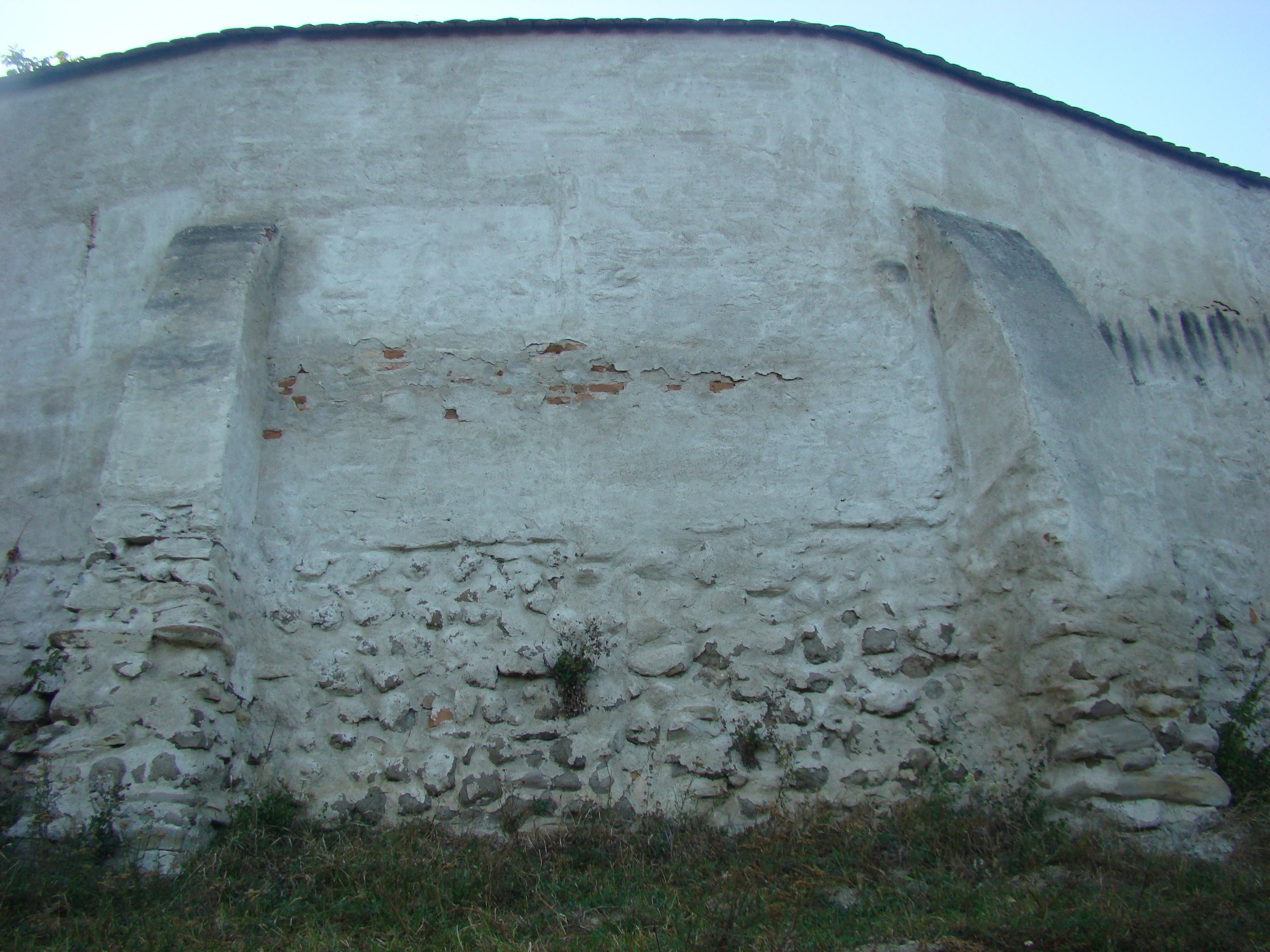 Bălcaciu, Alba 02